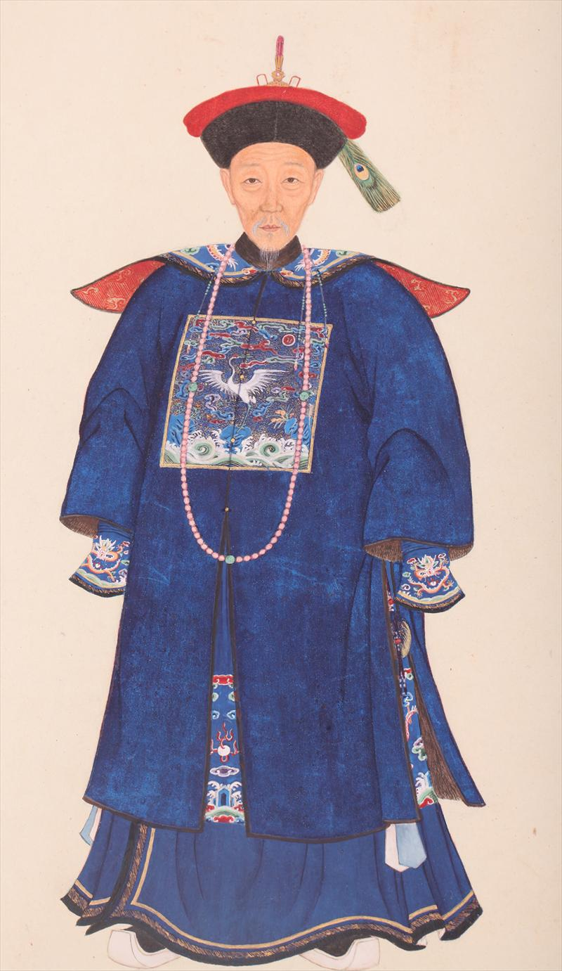 《御筆平定臺灣二十功臣像贊》中的李侍堯畫像，2014年由紐約iGavel拍賣行拍賣。畫像右側為清朝乾隆皇帝御筆的題贊：「閩浙總督李侍堯 以恒入覲命徃閩疆戰固老矣謀猷元長渡兵濟餉井々有方不誤軍儲其績孔臧」。